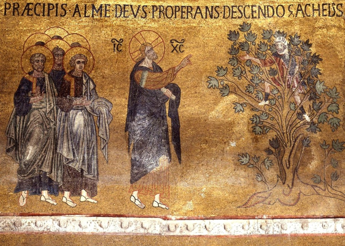 Иисус и Закхей. Собор Святого Марка. Свод к востоку от купола святого Леонарда.(мозаика, XI век)